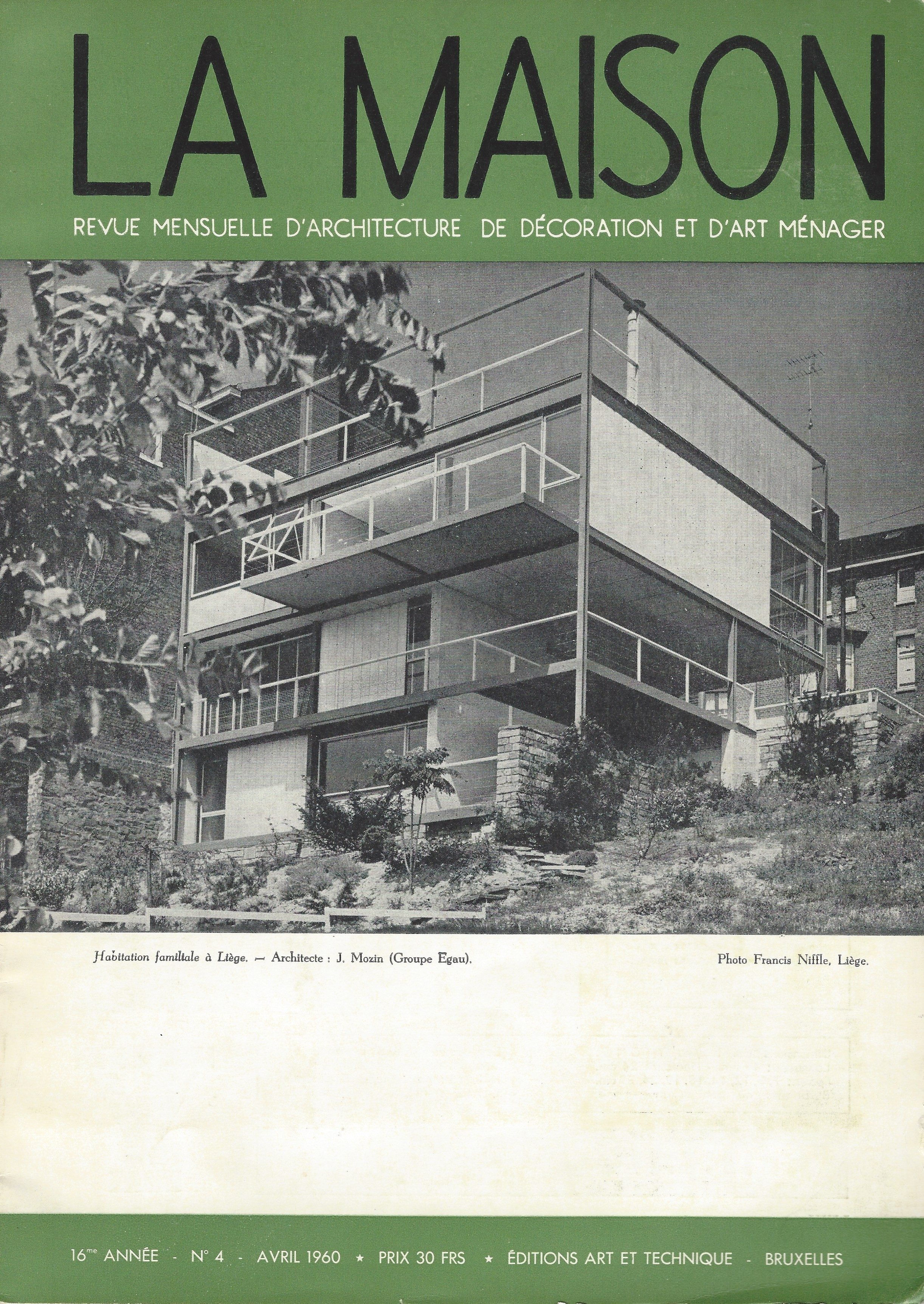 Une de la revue d’architecte La Maison